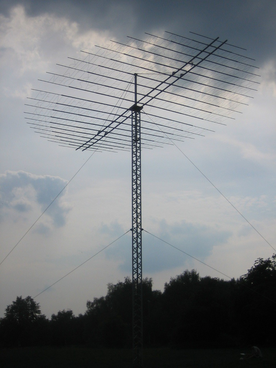 Auf den ersten Blick denkt man, es ist eine große Funkantenne, die einfach mitten auf einer Parkwiese steht. Dann fällt einem auf, es sind überhaupt keine Kabel sichtbar oder Schaltschränke oder irgendwas in der Nähe. Dann geht man etwas näher heran und stellt fest, die feinen Antennendrähte sind in Wirklichkeit Buchstaben. Münster (Westfalen)